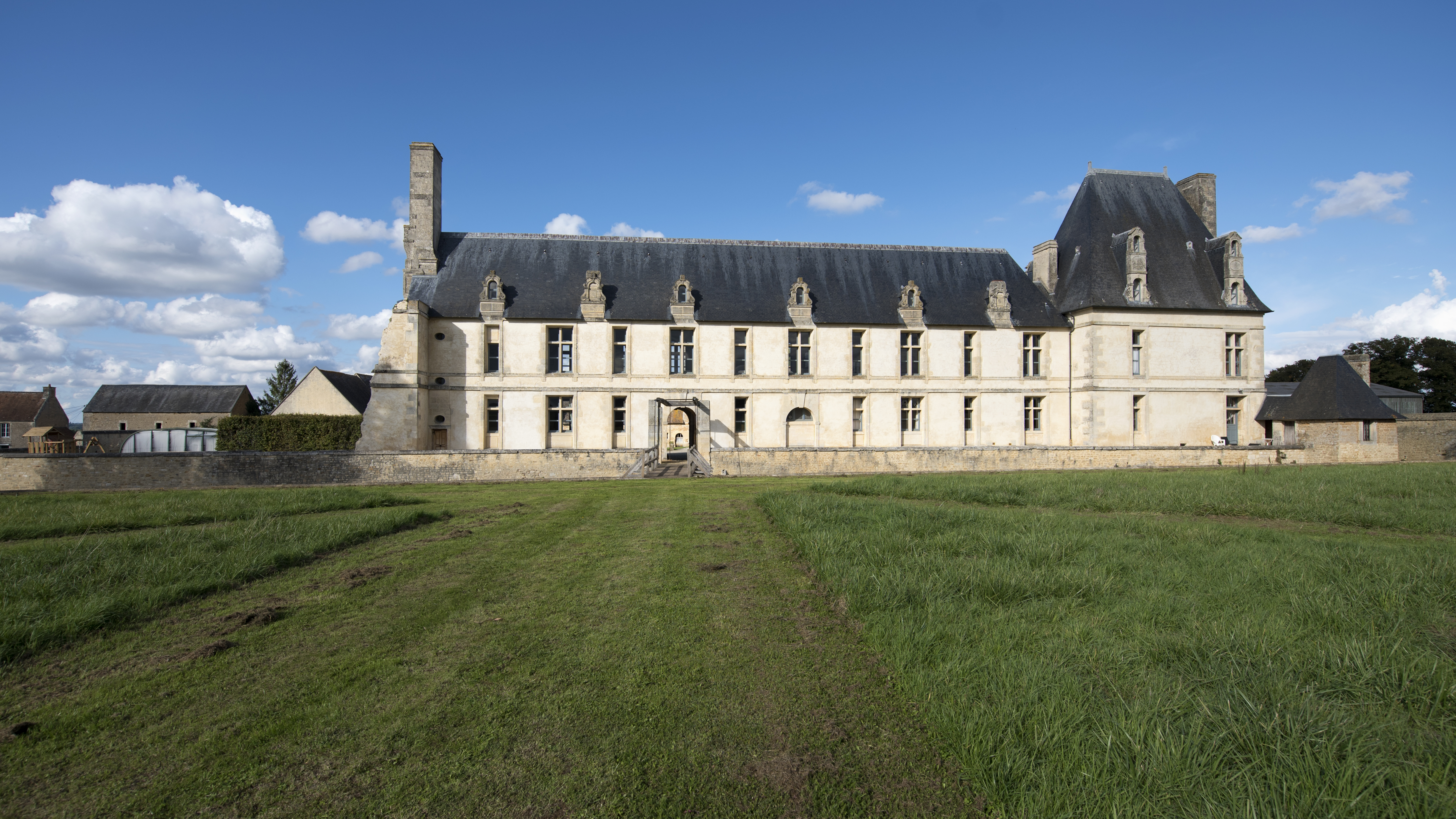 Château de Fresney-le-Puceux, Calvados, 2017. .